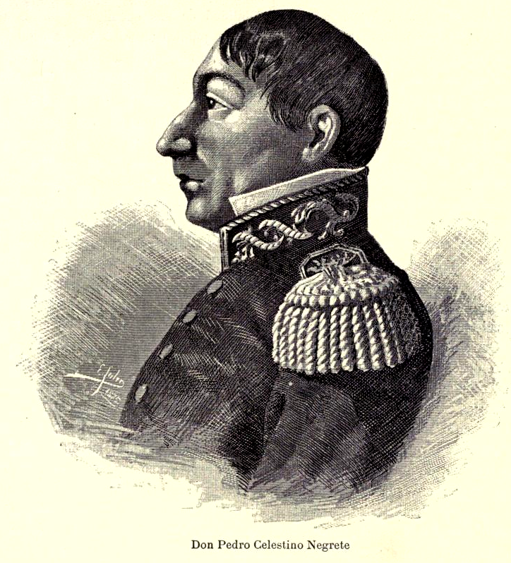 Imagen extraída del libro de Vicente Riva Palacio, Julio Zárate (1880) "México a través de los siglos" Tomo III: "La guerra de independencia" (1808 - 1821)